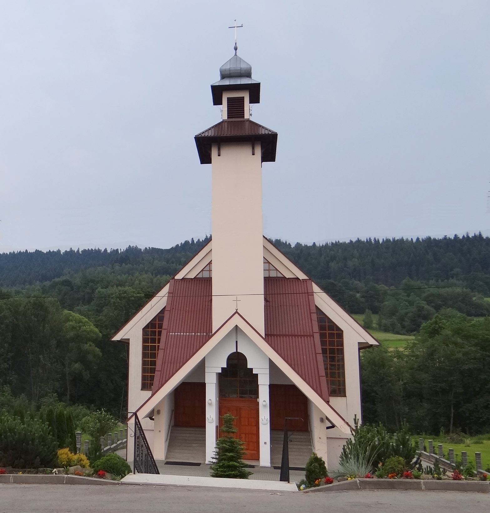 Kościół w miejscowości Las